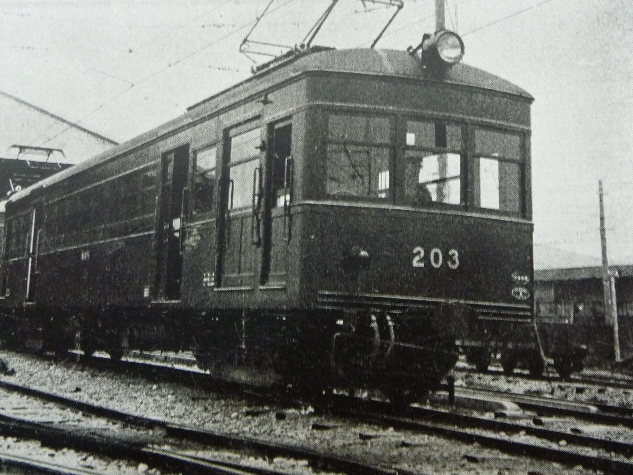 伊予鉄100系電車